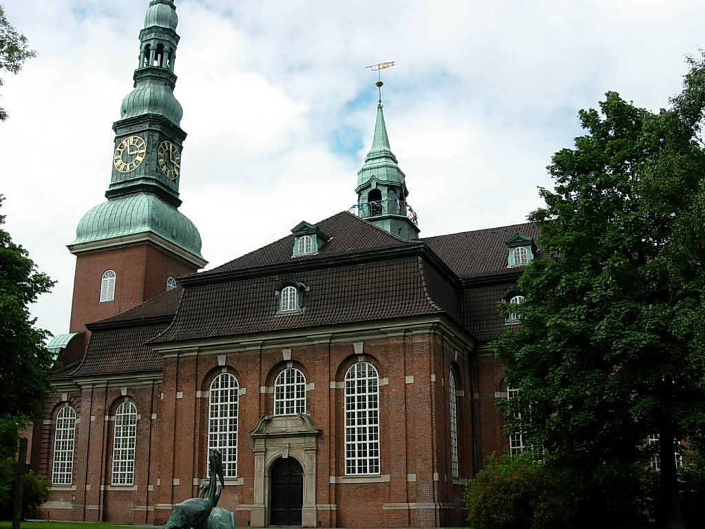 Die Hauptkirche St. Trinitatis in Altona-Altstadt wurde 1742/43 von Cai Dose erbaut. Der Turm stammt von der Vorgängerkirche aus dem 17. Jahrhundert. Nach Zerstörungen im Zweiten Weltkrieg wurde sie von 1954 bis 1969 durch Friedhelm Grundmann und Horst Sandtmann wieder aufgebaut. Von der ehemals reichen Innenausstattung sind lediglich ein Pastorenbild von 1654 und ein Kruzifix aus dem 13. Jahrhundert erhalten.